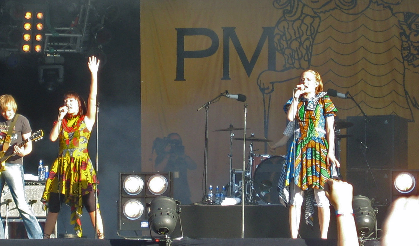 PMMP, Provinssirock 2006, Finland.